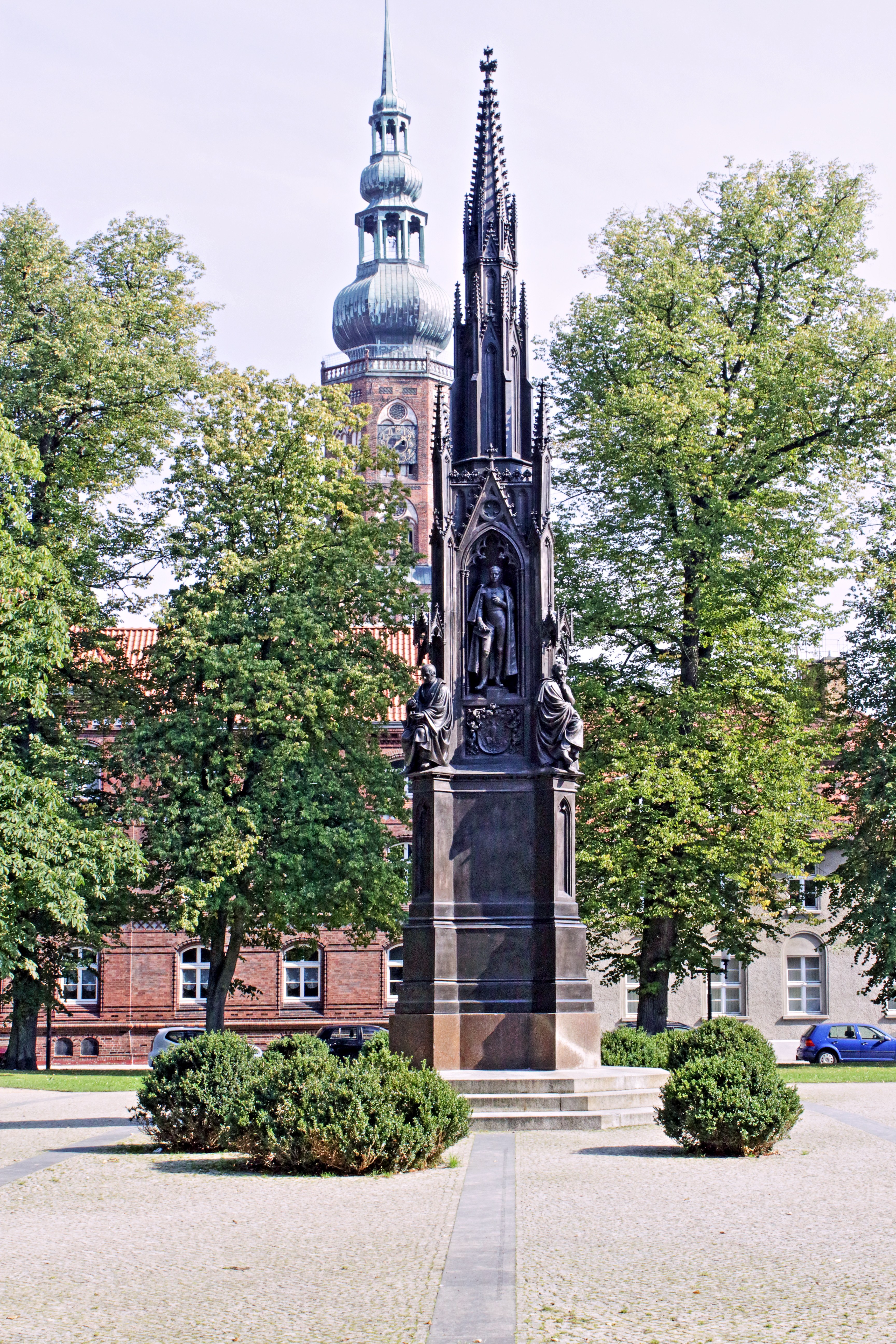 Rubenowdenkmal auf dem Rubenowplatz vor dem Universitäts Hauptgebäude in Greifswald. Im Hintergrund: der Greifswalder Dom.